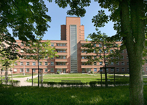 Tübingen. Das als chirurgische Klinik 1932 erbaute Gebäude, das jetzt die Universitäts-Frauenklinik beherbergt.